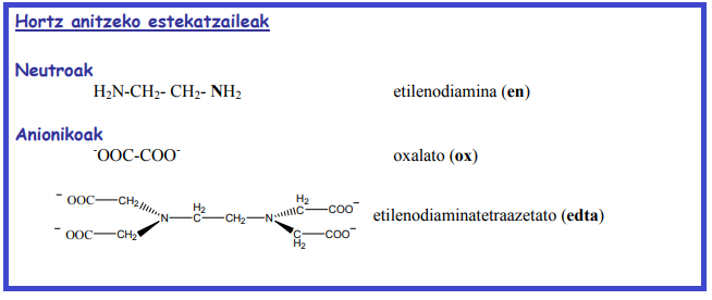 Hortz anitzeko estekatzaileak